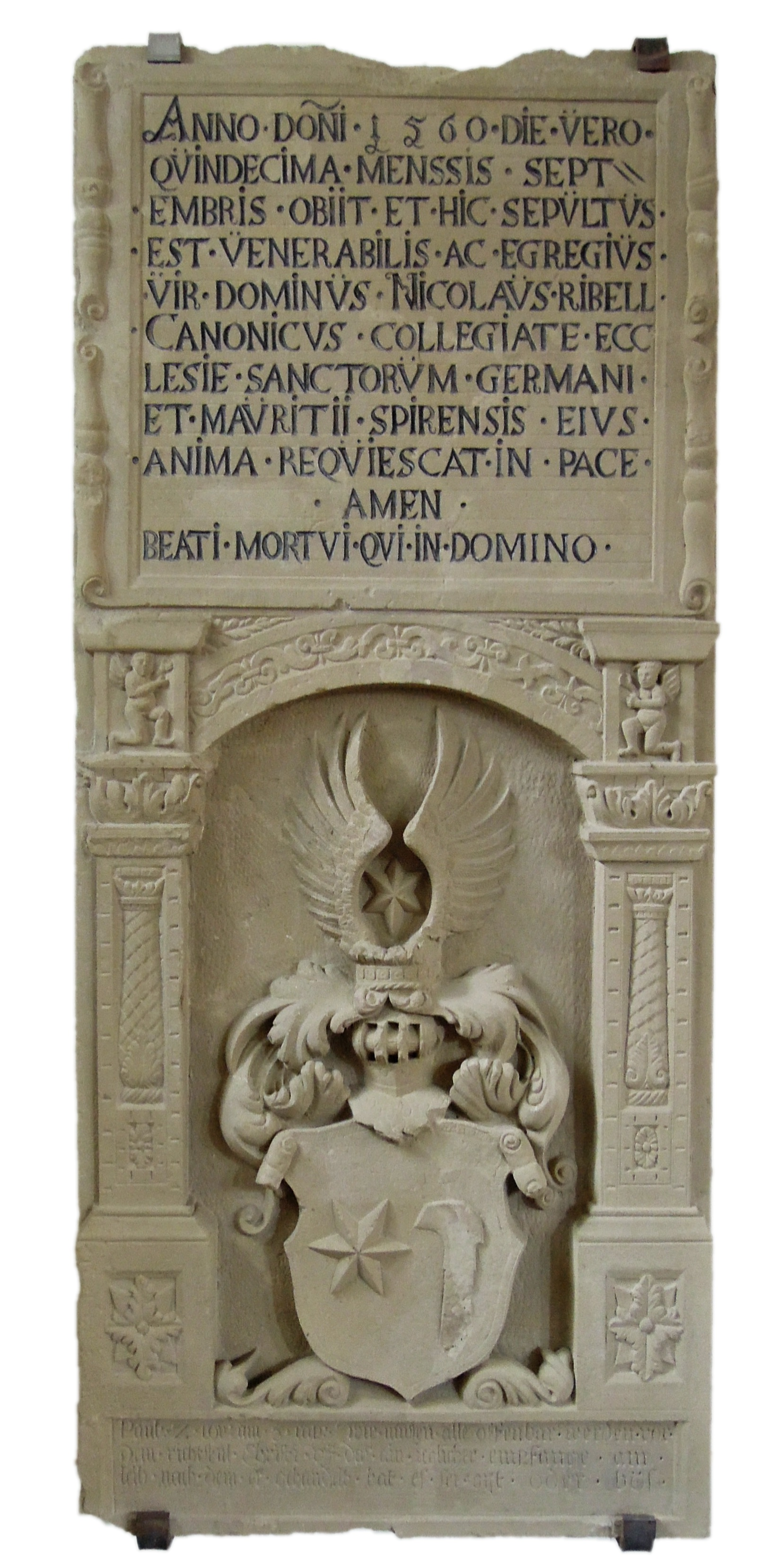 St. Vitus in Bad Schönborn, Epitaph Nicolaus Ribell († 1560)